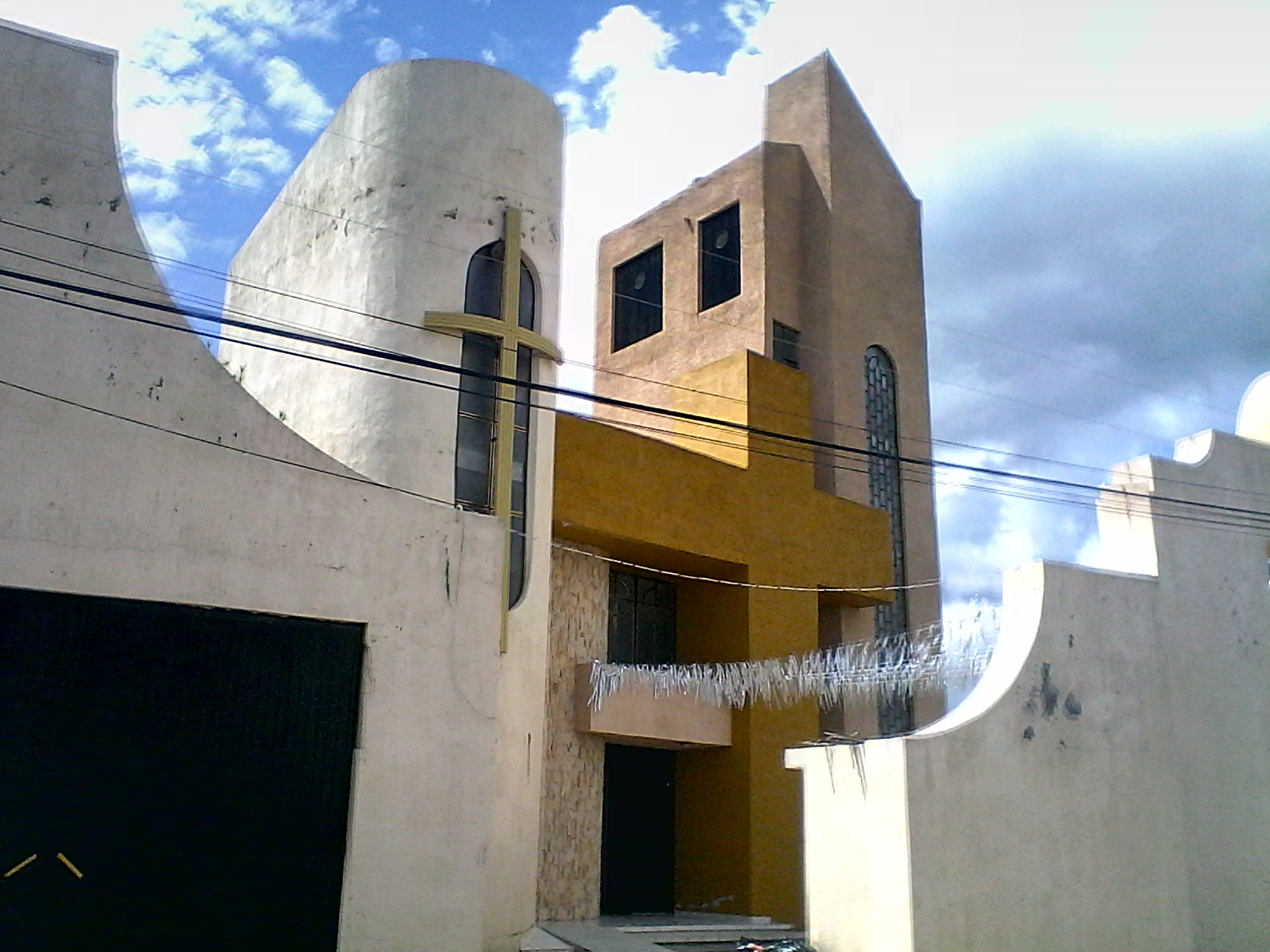 templo principal de cantabria